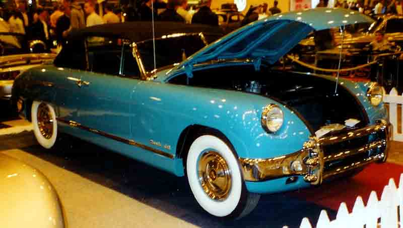 Muntz Convertible